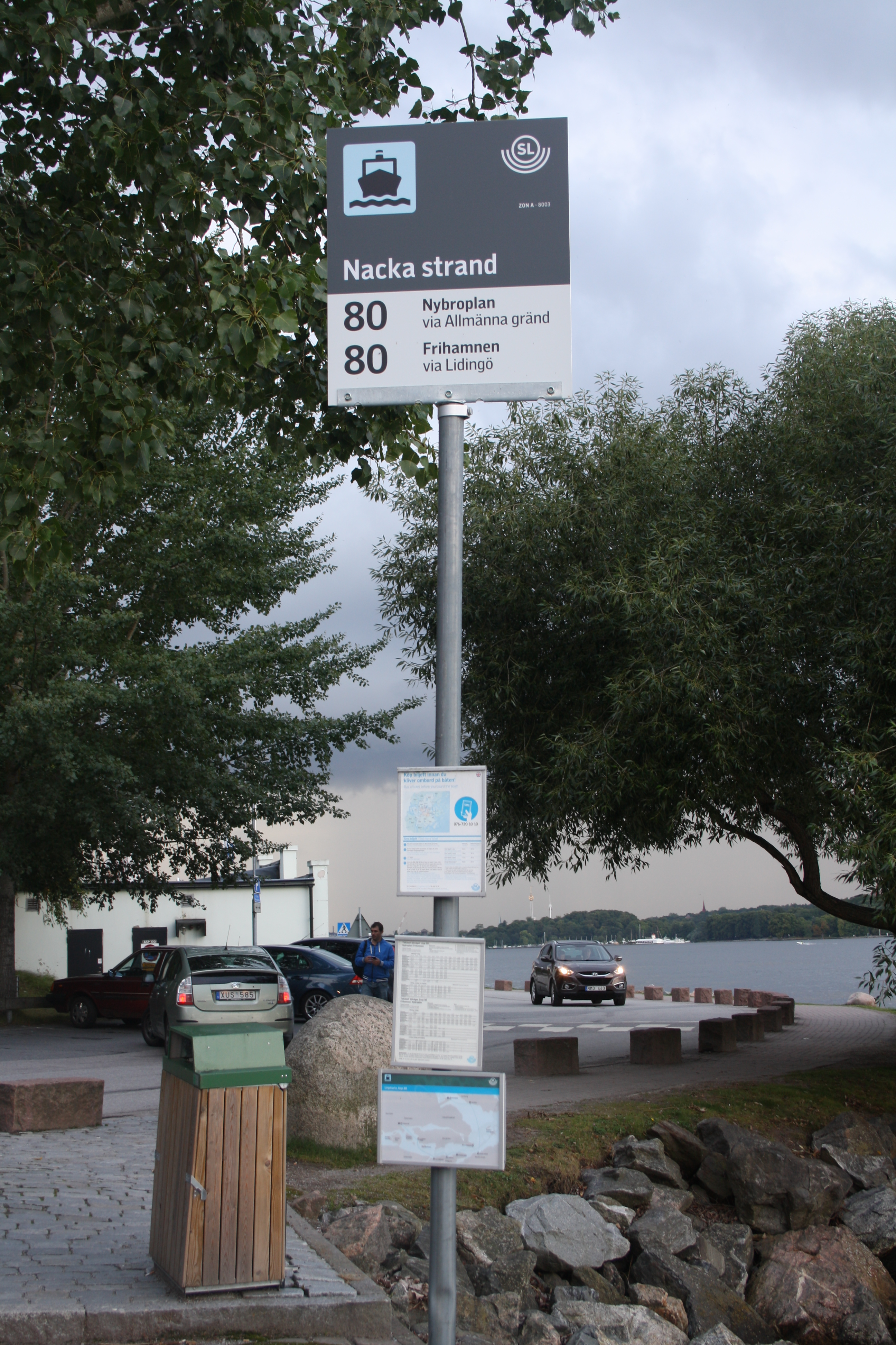 Hållplats för Sjövägen i Nacka Strand